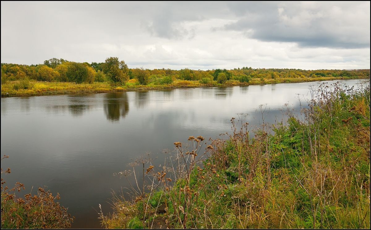 река Юрас, приток Северной Двины, осенью